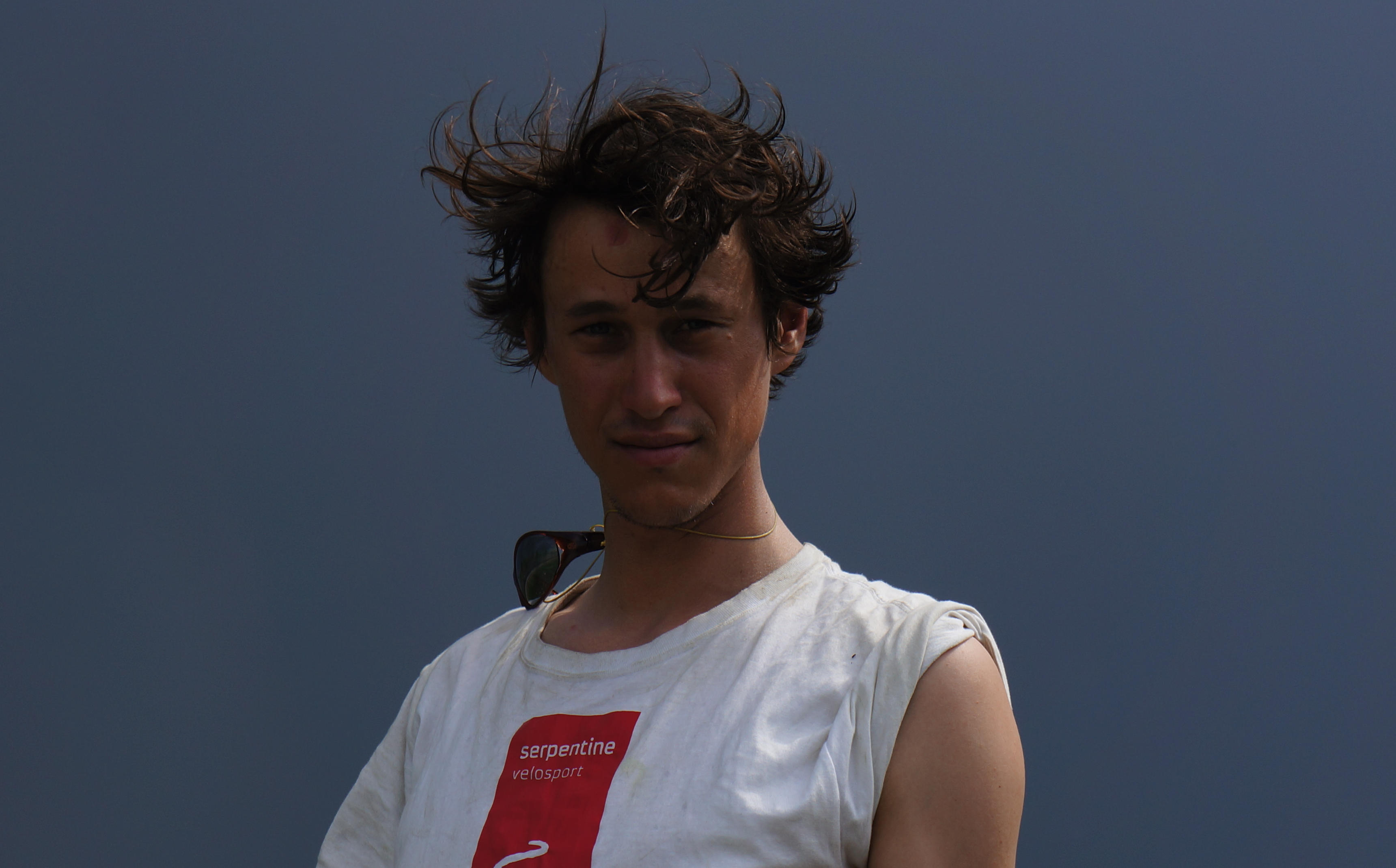 Paul Höpner